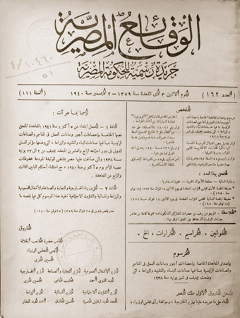 صورة لعدد من جريدة الوقائع المصرية عام 1940